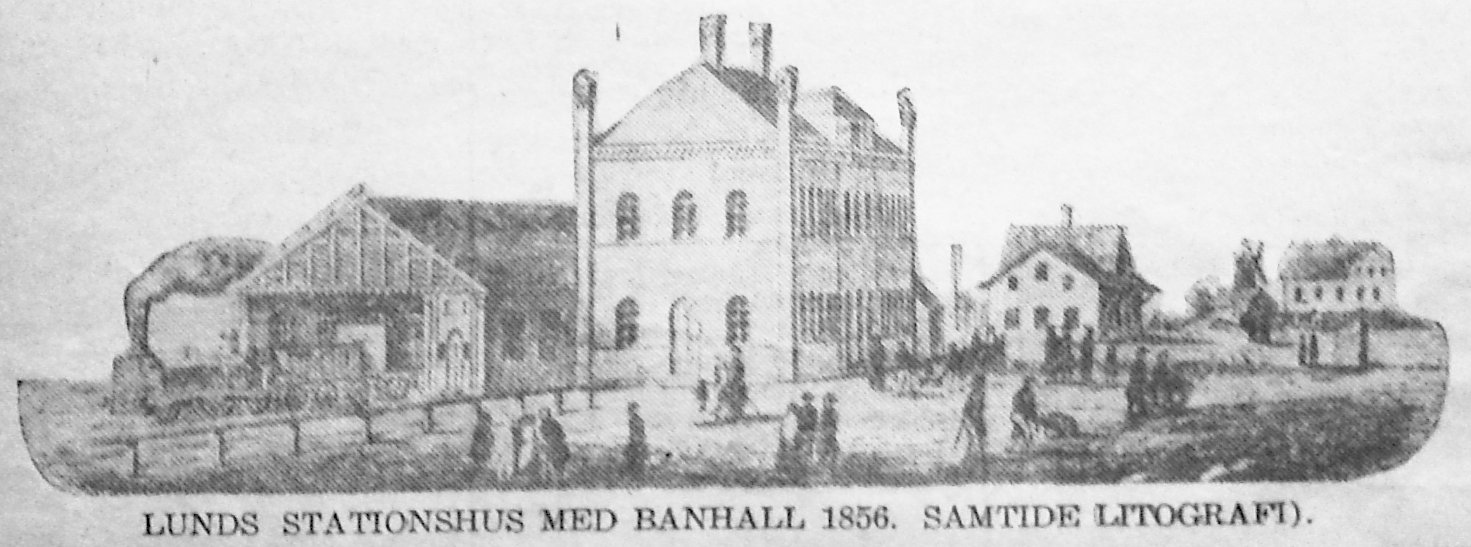 Lunds station och godsmagasin